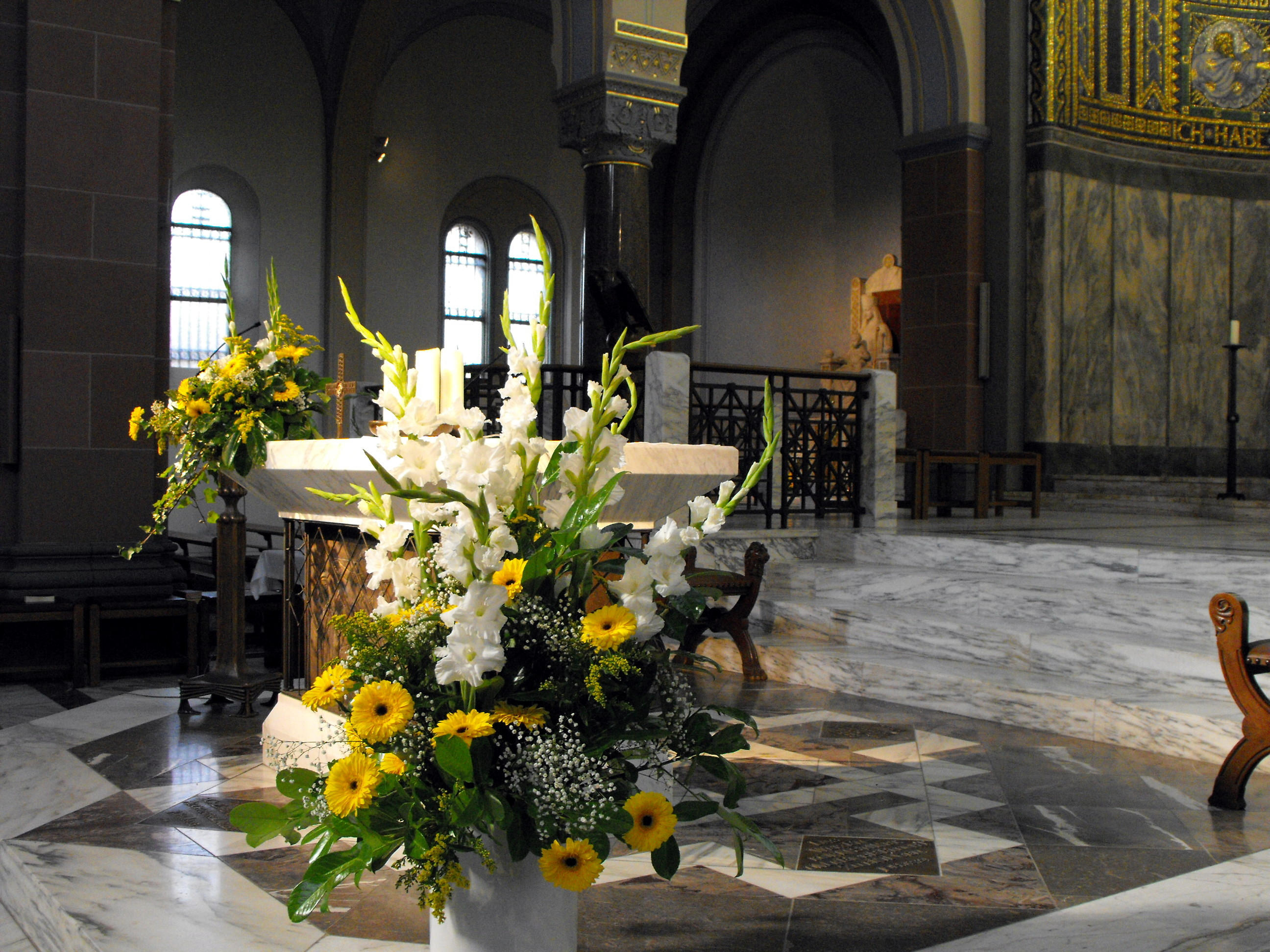 Altar der Herz Jesu-Kirche (Aachen-Burtscheid) mit festlichem Blumenschmuck